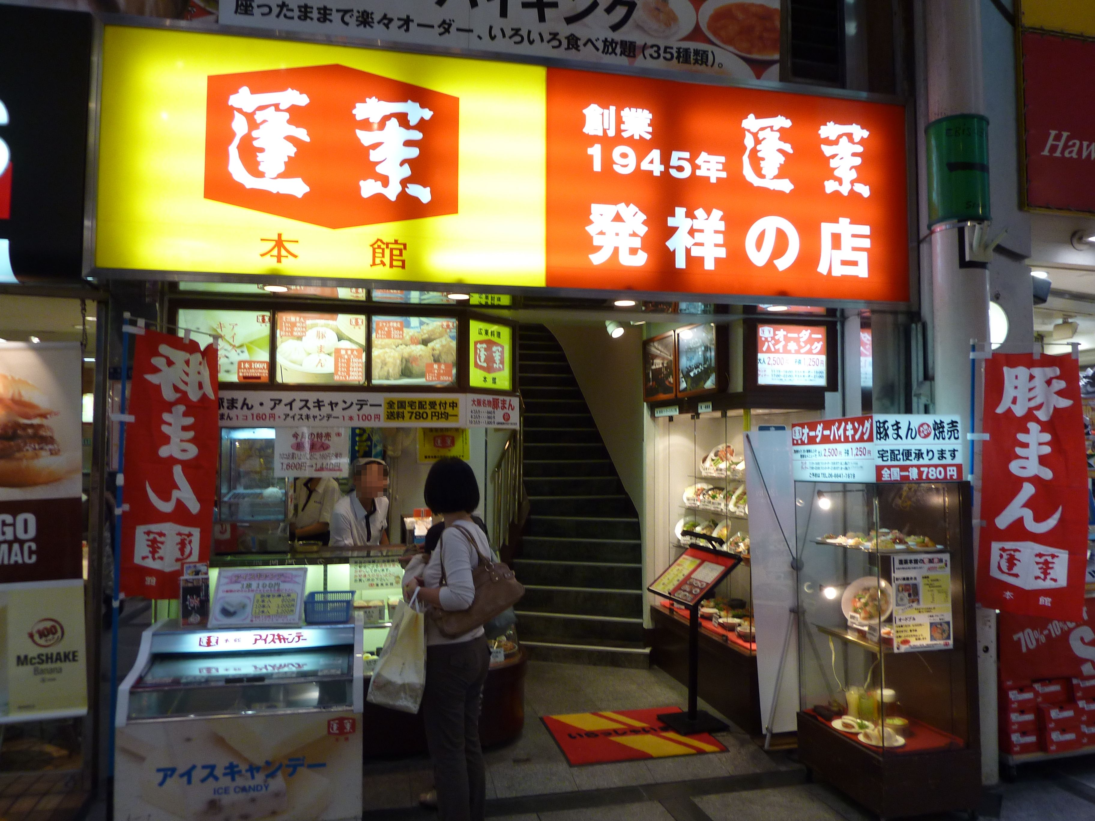 蓬莱本館